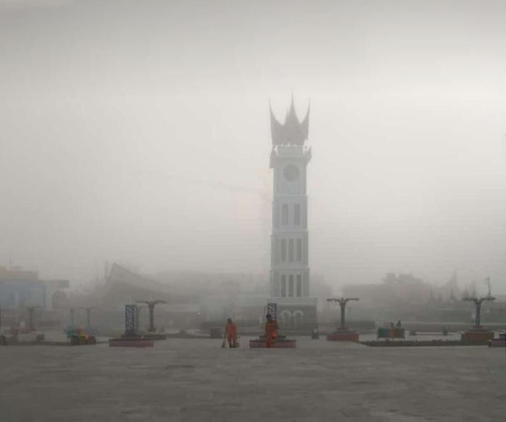 Kabut Jam Gadang pada 2019